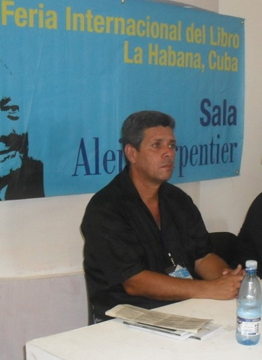 Escritor cubano Marco Antonio Calderón Echemendía